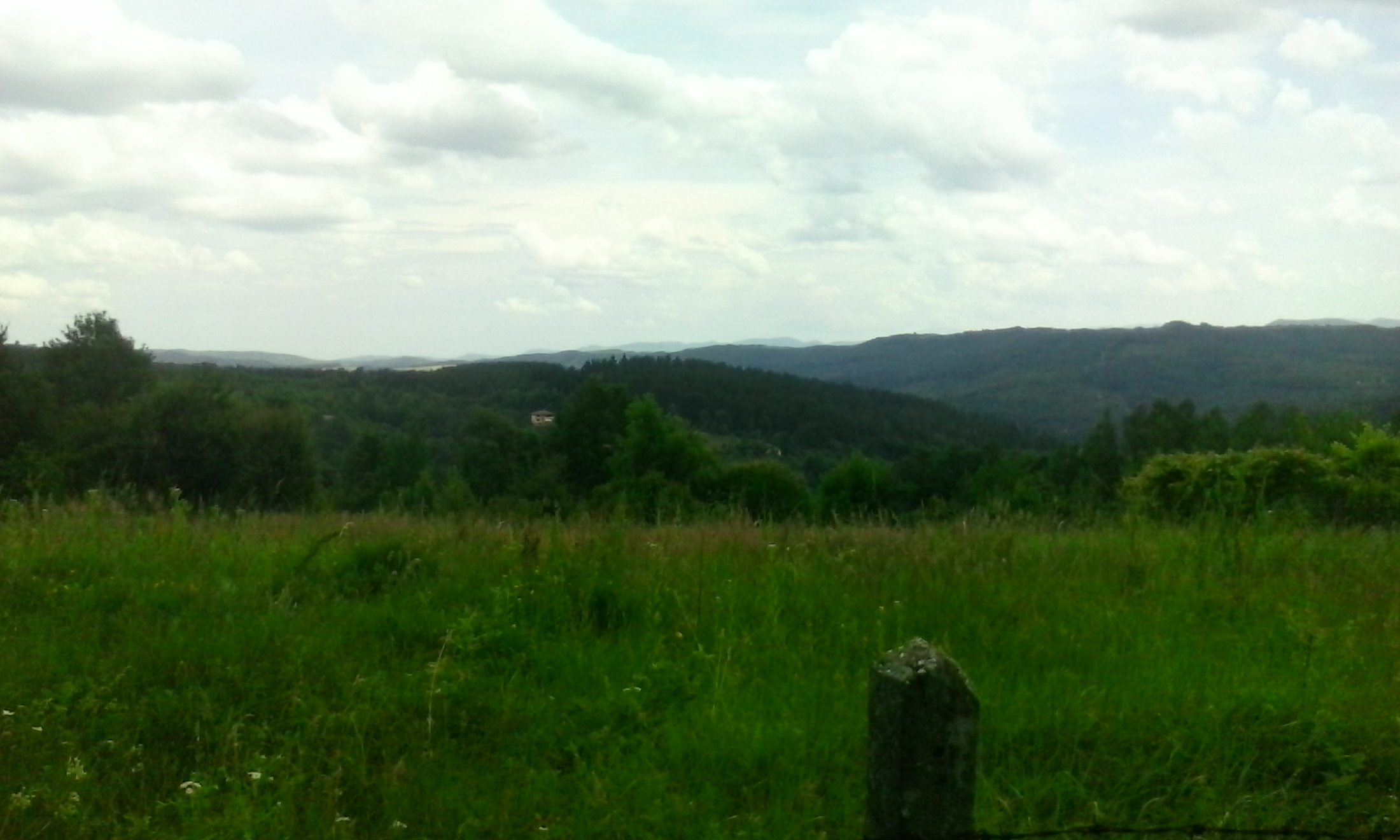 Веленци - панорама към планината